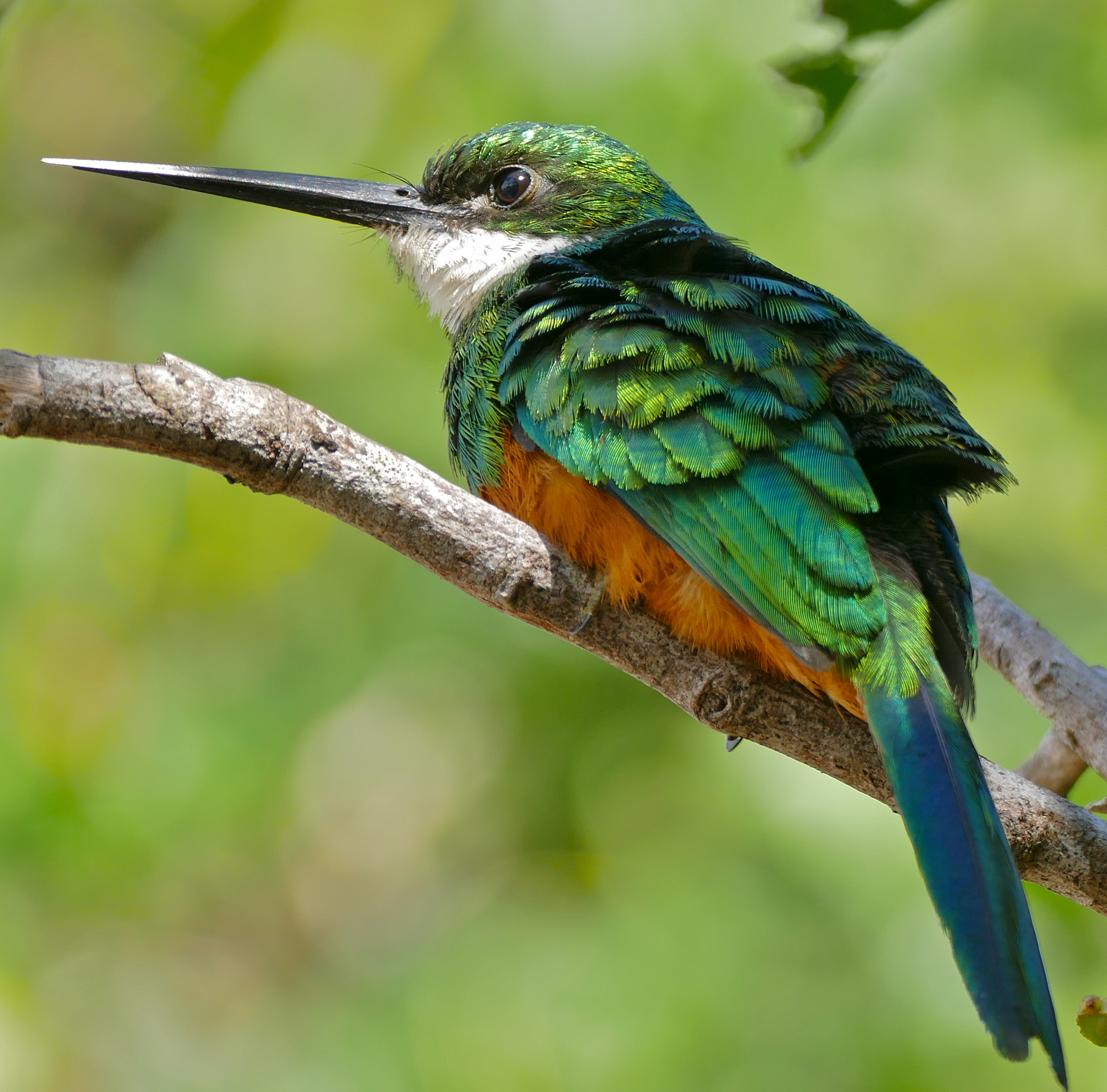 Rio Sararé Gallery Forest, Pixaim, Transpantaneira, Poconé, Mato Grosso, BRAZIL